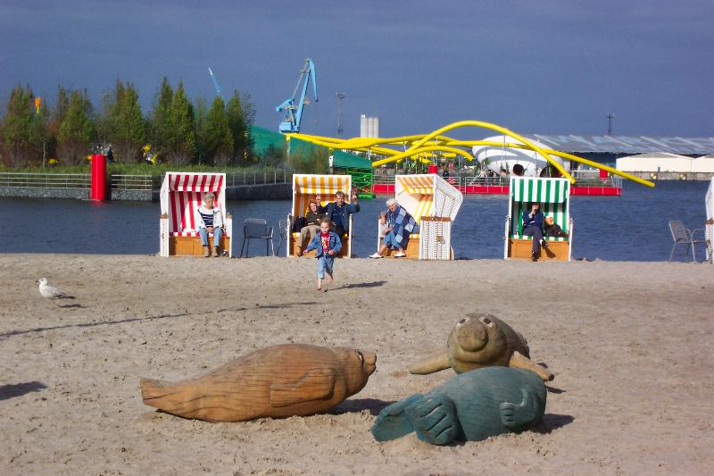 Internationale Gartenbauausstellung Rostock 2003, der IGA-Strand, dahinter die schwimmenden Gärten